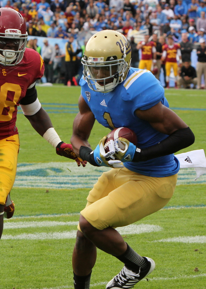 Shaquelle Evans of UCLA against USC